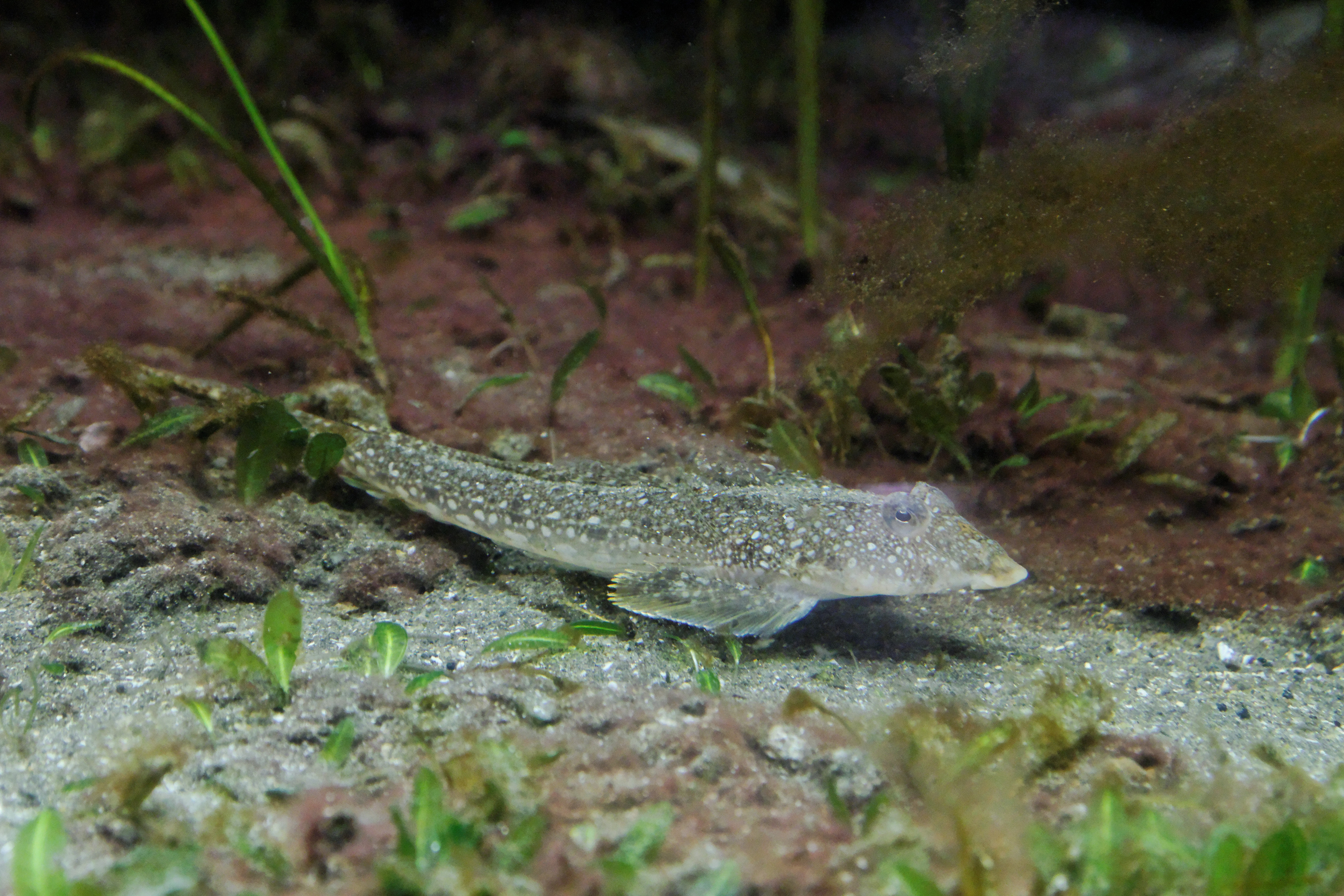 Repomucenus richardsonii